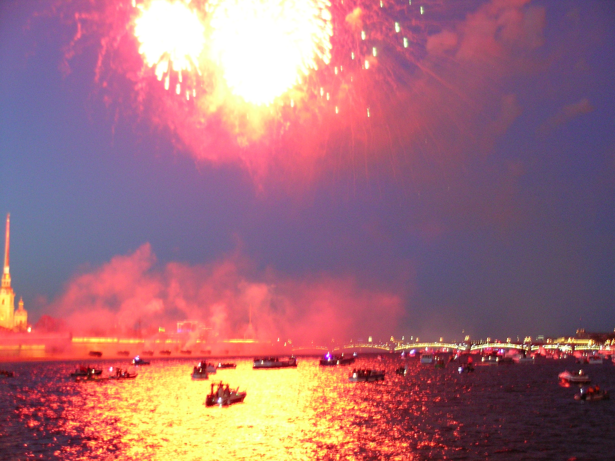 Салют в Санкт-Петербурге. 70-лет Победы.